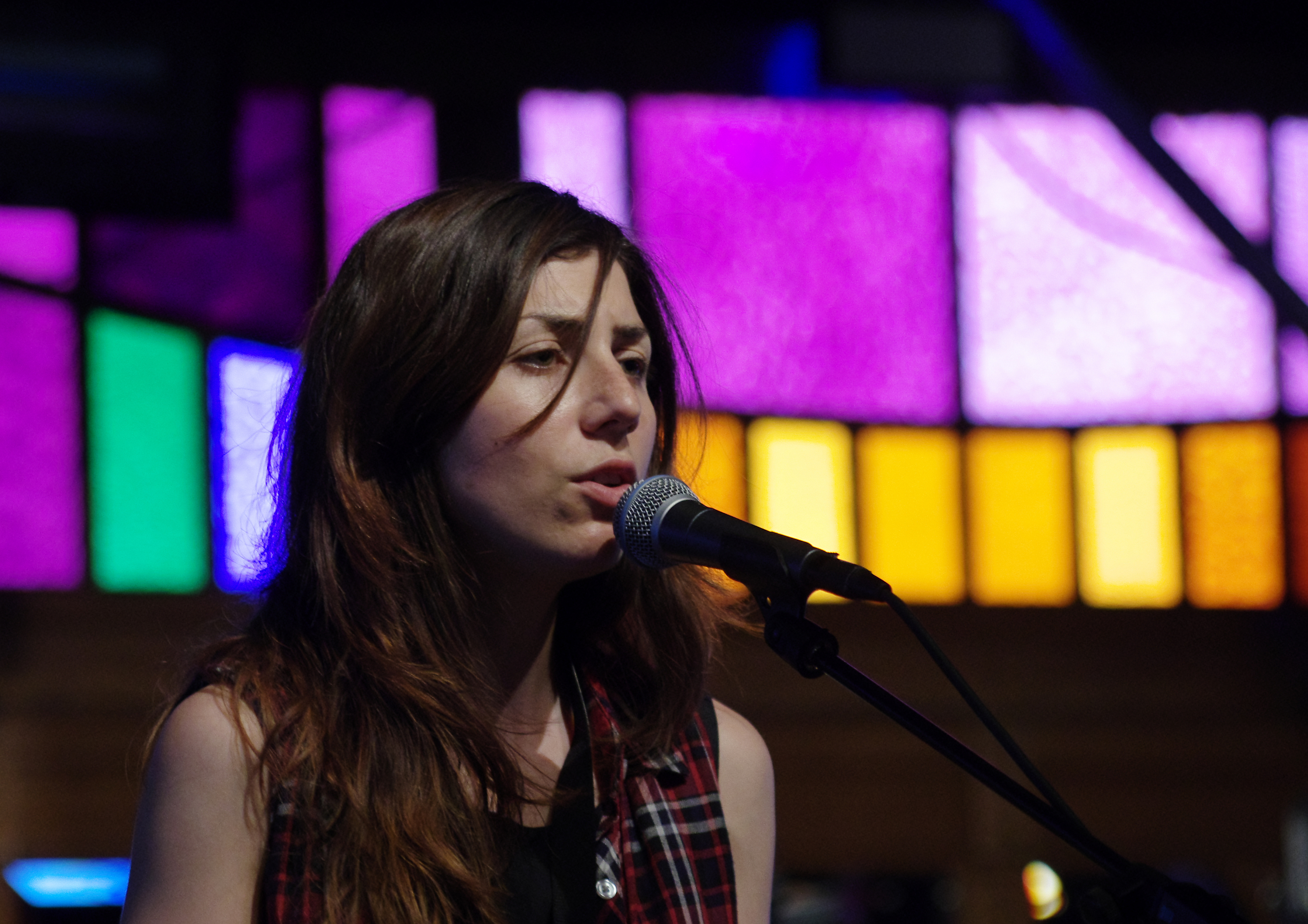 Julia Holter mit Begleitband auf dem Haldern Pop Festival 2013. Soundcheck